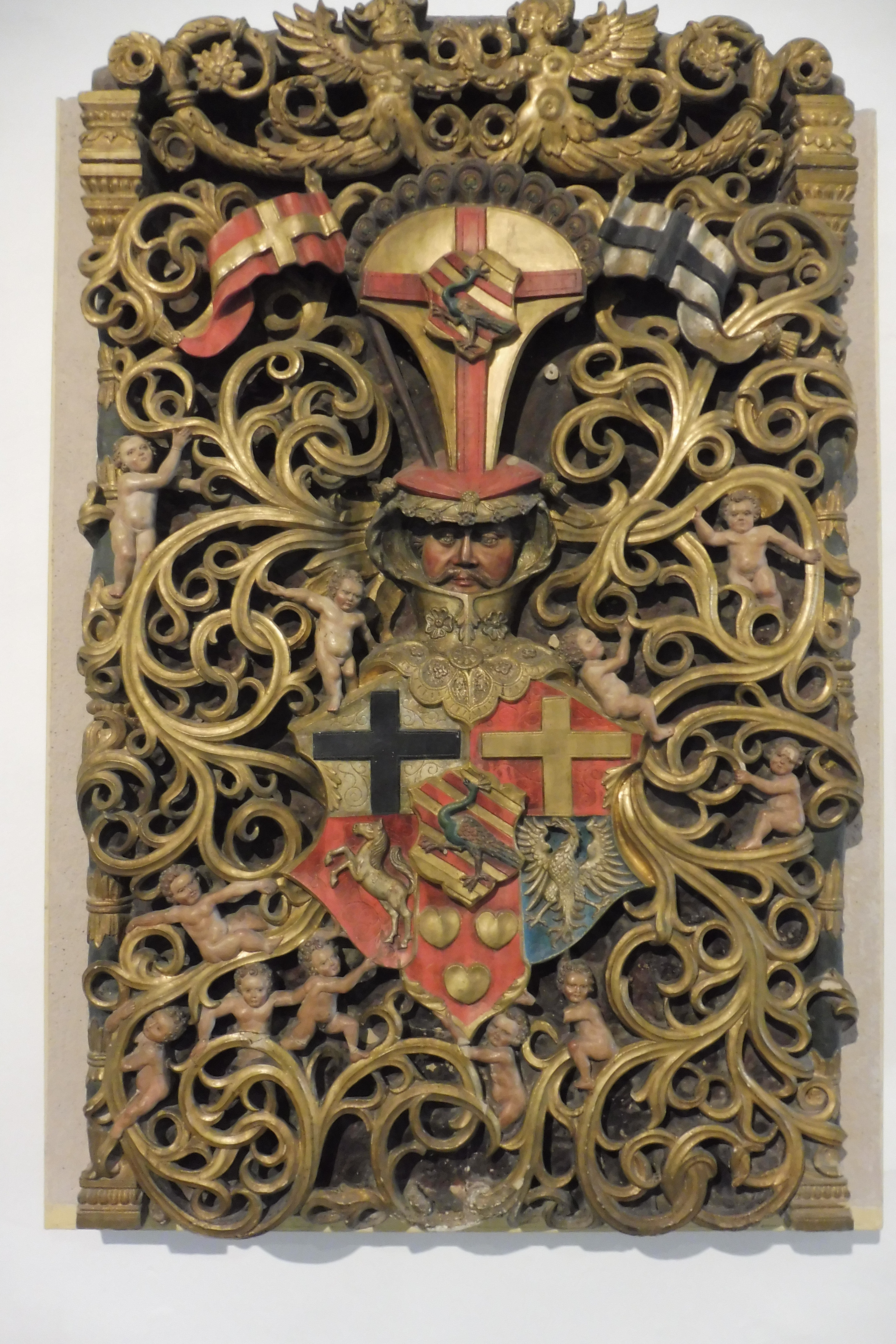 Wappen von Hermann von Wied im Residenzmuseum Schloss Neuhaus. Der Wappenstein befand sich unsprünglich am Treppenturm des Hauses Wied (auch Haus Köln genannt).